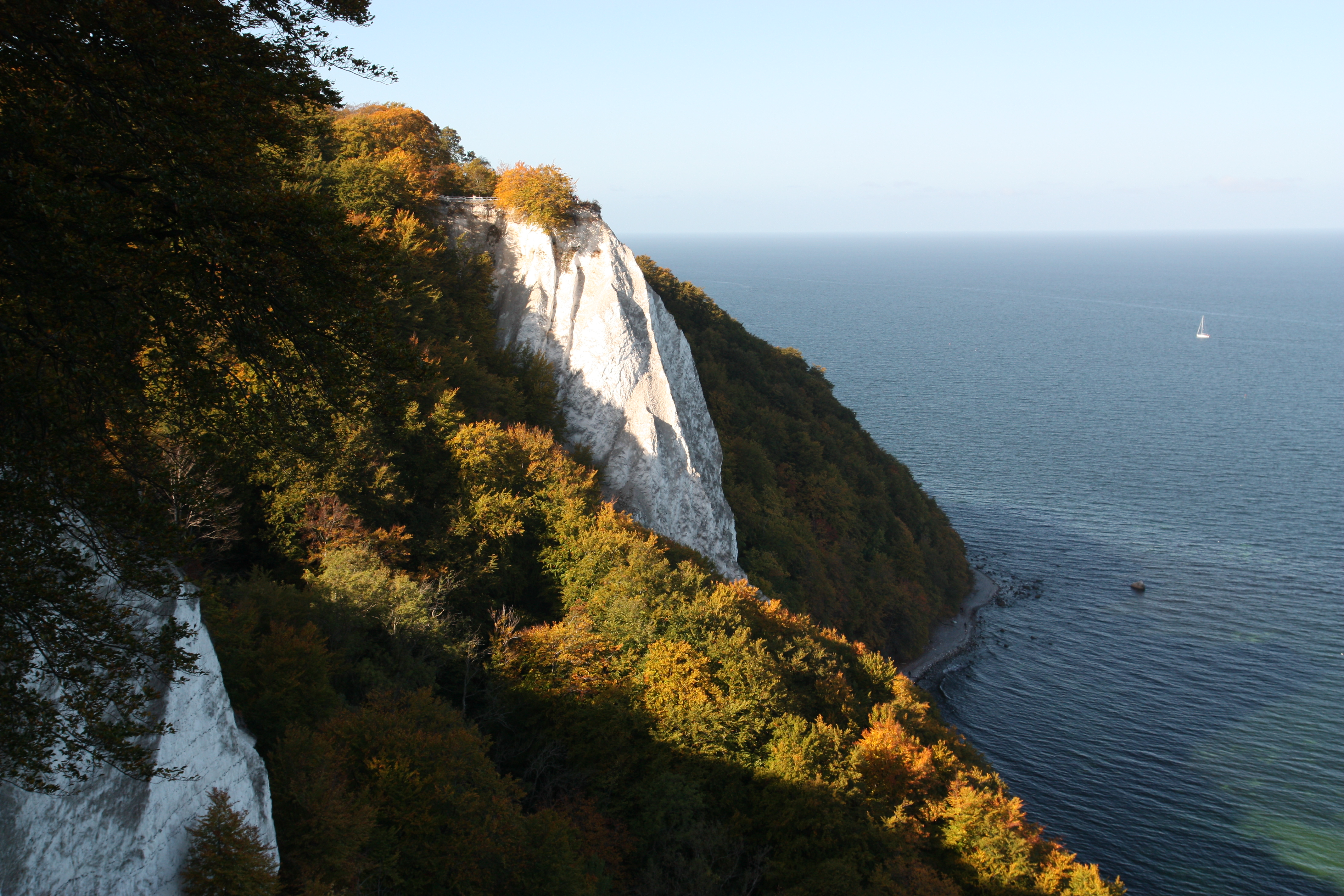 Königsstuhl auf Rügen, von der Victoria-Sicht aus aufgenommen. Königsstuhl on the island of Rügen, as seen from the Victoria-Sight.